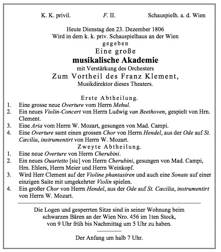 Abschrift des originalen Anschlagzettels in Wien, Theatermuseum